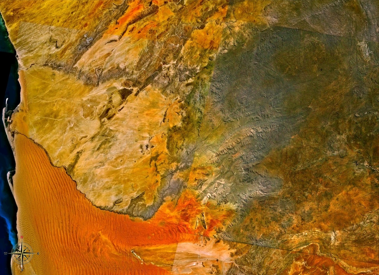 Kuiseb, Namibia